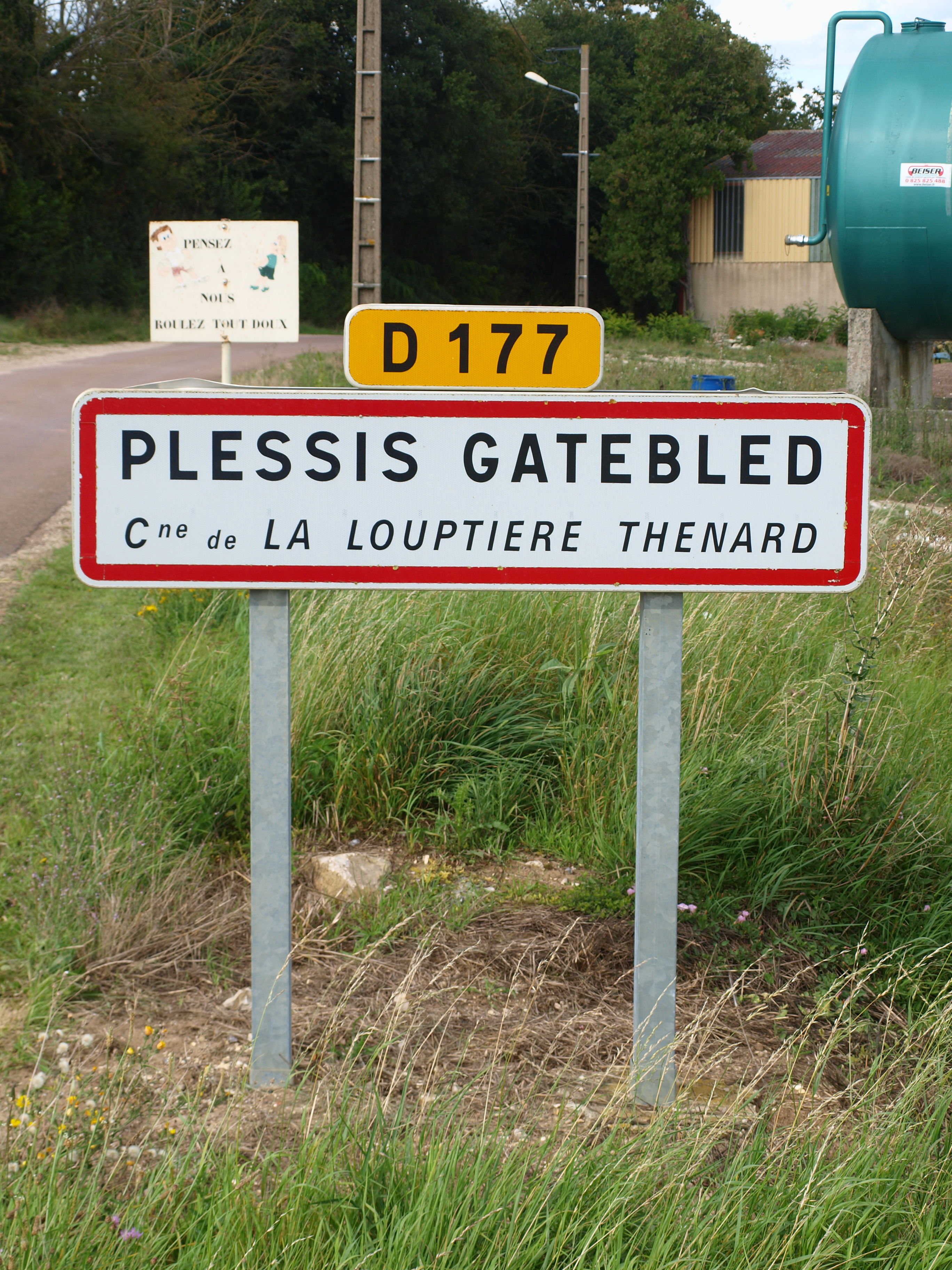 La Louptière-Thénard (Aube, France) ; village de Plessis-Gatebled : panneau d'agglomération